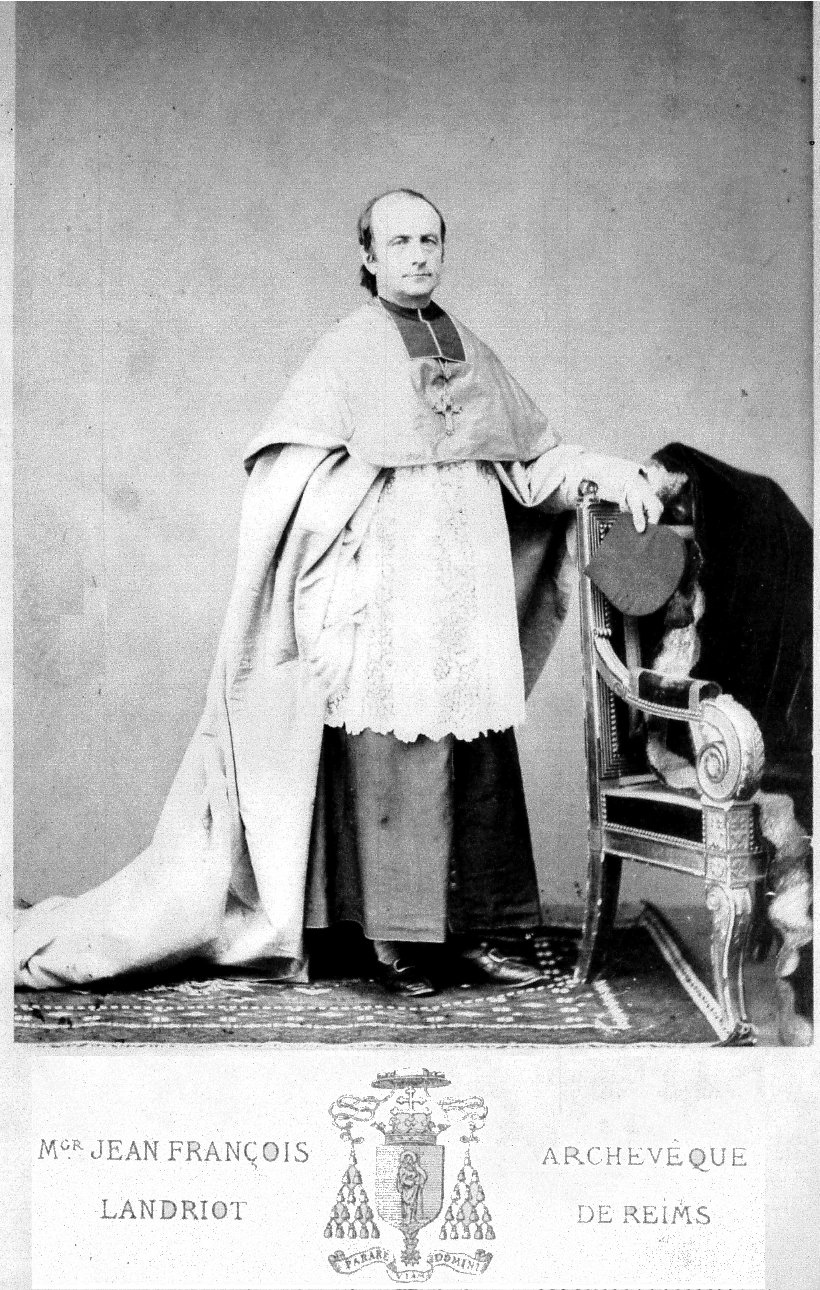 relevé du microfilm 96.